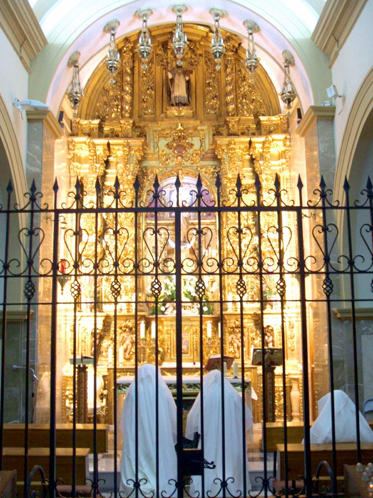 Convento de las Esclavas del Santísimo Sacramento y de María Inmaculada (Iglesia de San Clemente), en Jaén